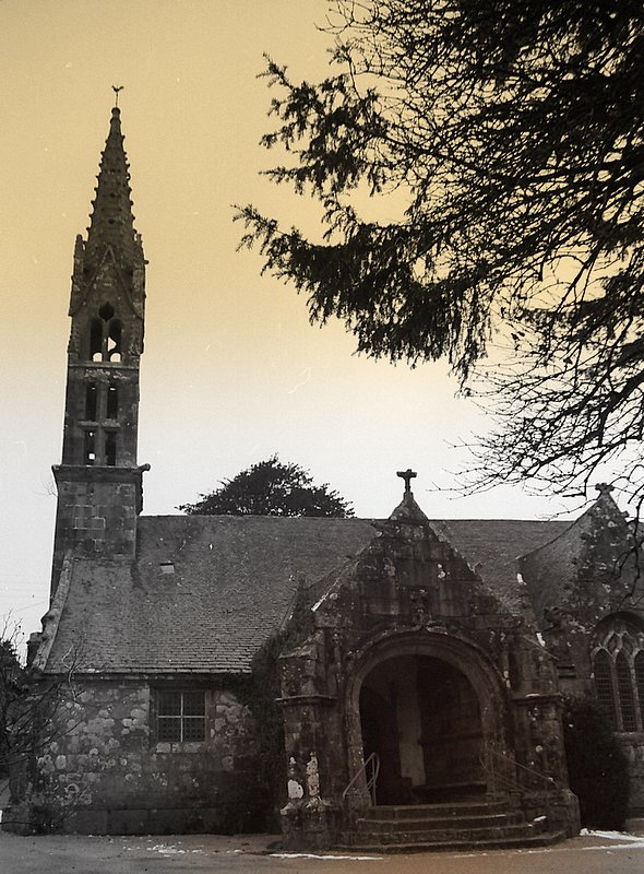 église Loqueffret, denez goasguen.